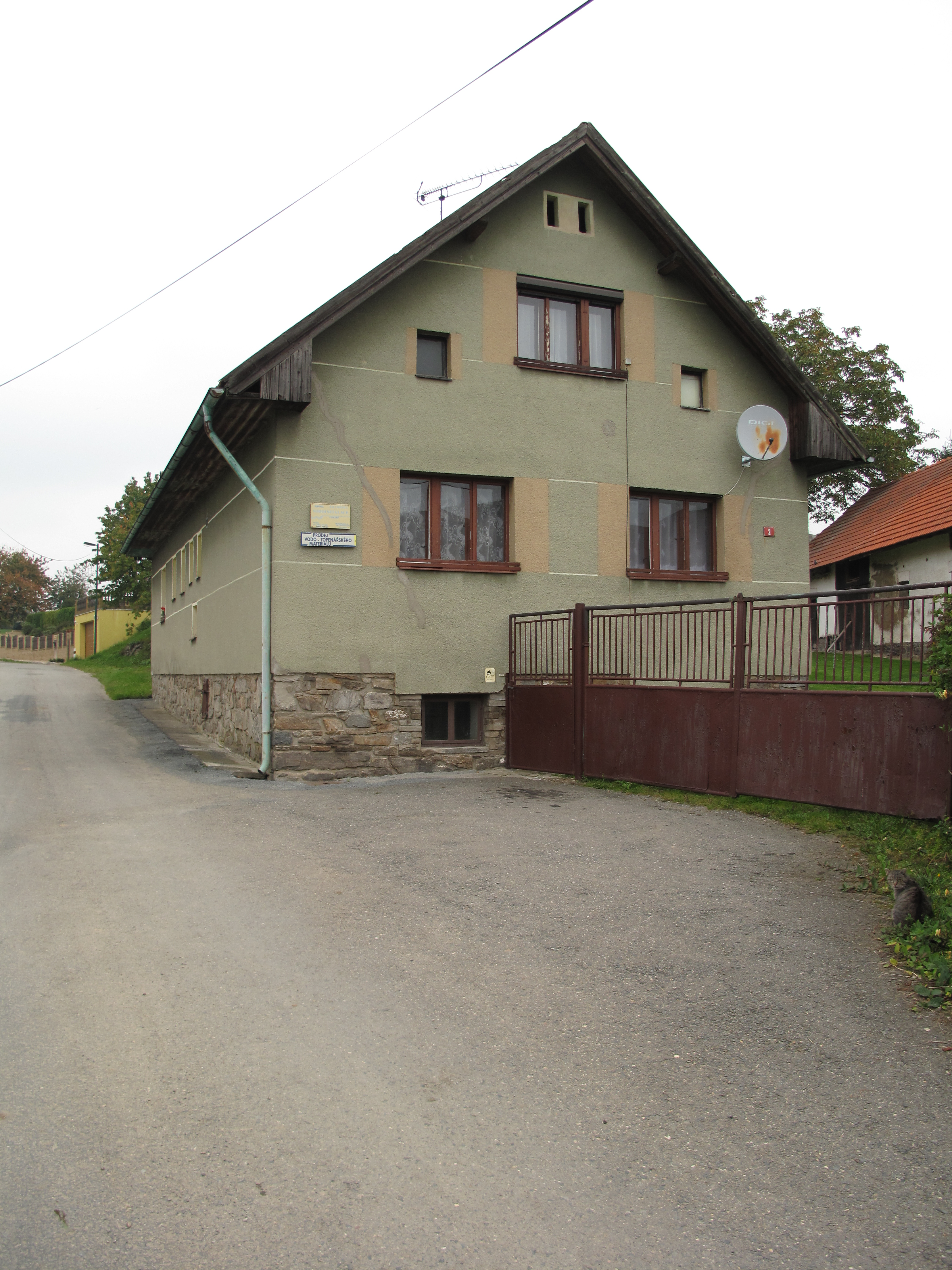 Hospoda v Mysleticích. Okres Benešov, Česká republika.